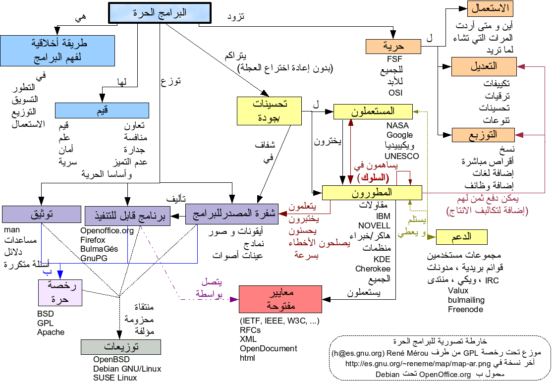 الملف الأصلي